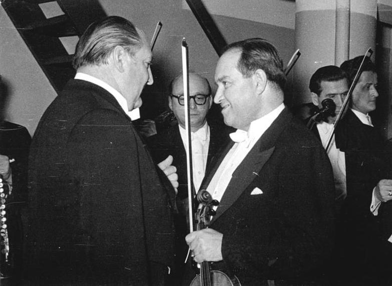 Zentralbild-Nitzschke Pa-Ho. 8.12.1956 Grosser Erfolg des Leipziger Gewandhausorchesters in Moskau (UdSSR) Das Leipziger Gewandhausorchester unter Leitung von Nationalpreisträger Professor Franz Konwitschny gibt zur Zeit ein Gastspiel in Moskau und Leningrad. Allein in Moskau finden acht Konzerte statt, darunter auch mit den sowjetischen Geigern David und Igor Oistrach. UBz: Am 4.1.1956 gab das Leipziger Gewandhausorchester sein 6. Konzert im Großen Saal des Moskauer Tschaikowski-Konservatoriums, das durch das Doppelkonzert von Bach, dargeboten von David und Igor Oistrach zu einem Ereignis von besonderer Bedeutung wurde. Professor Konwitschny (links) und David Oistrach vor dem für das Gewandhausorchester historischen Konzert mit David und Igor Oistrach.